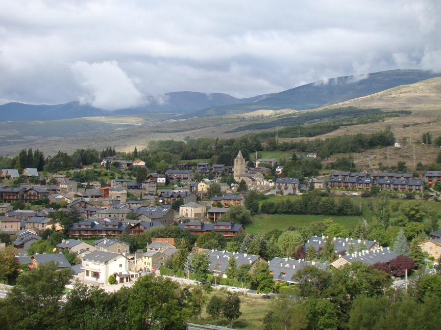 Village de Bolvir, Basse Cerdagne, Catalogne